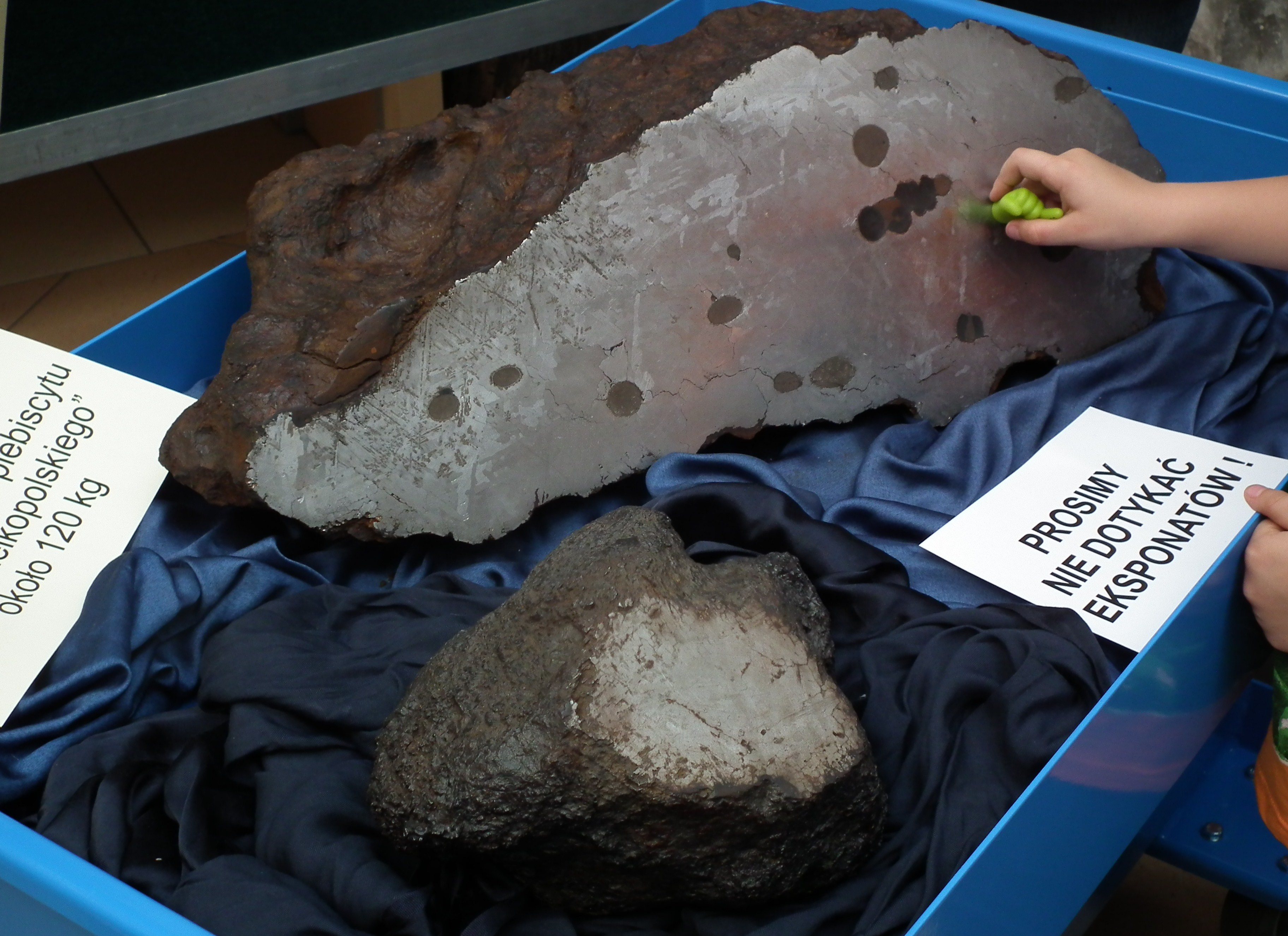 Muzeum Ziemi UAM, Poznań.